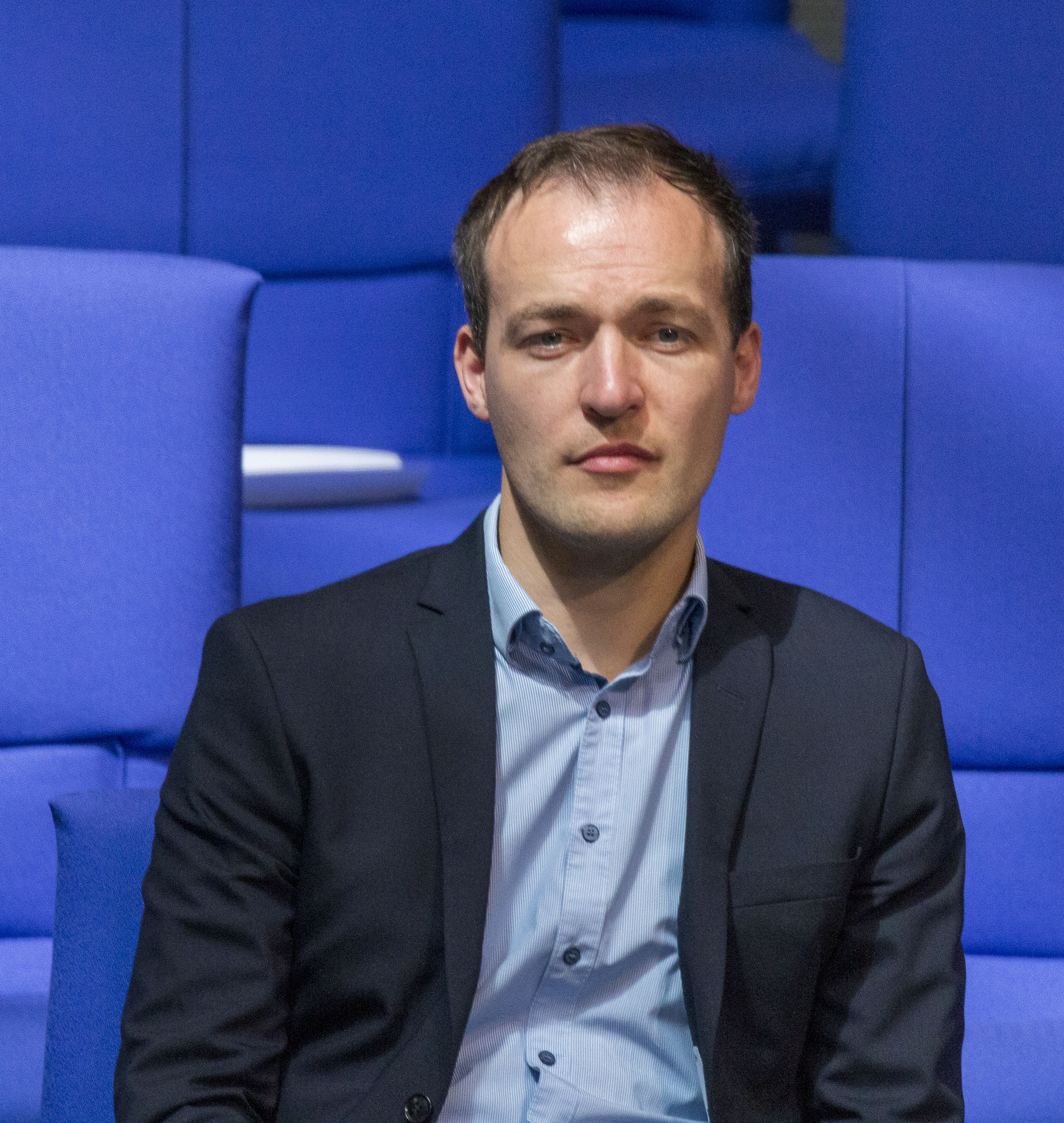 Bundestagsabgeordneter der AfD während der Plenarsitzung des Deutschen Bundestages am 2. Juli 2020 in Berlin.